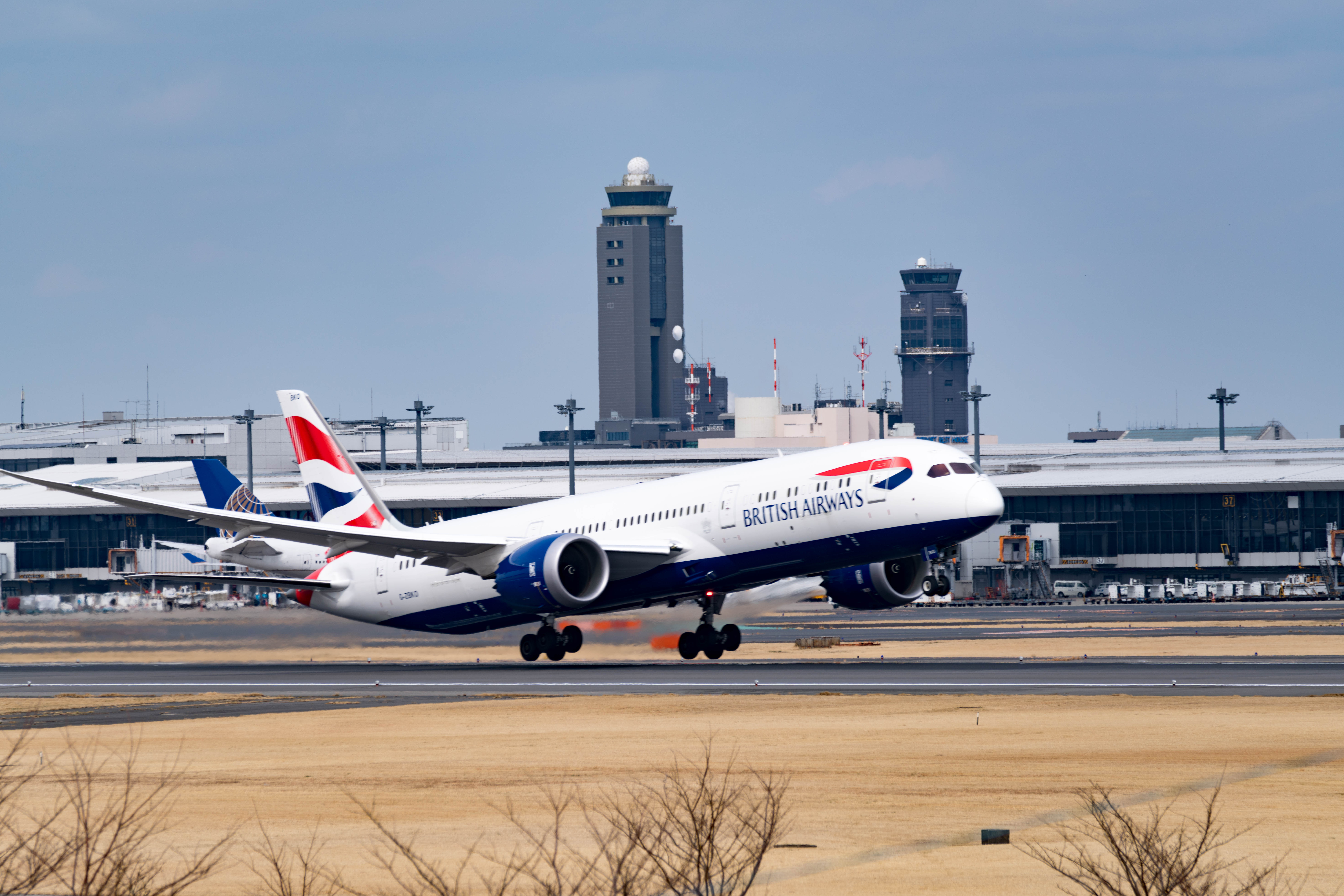 gzbko